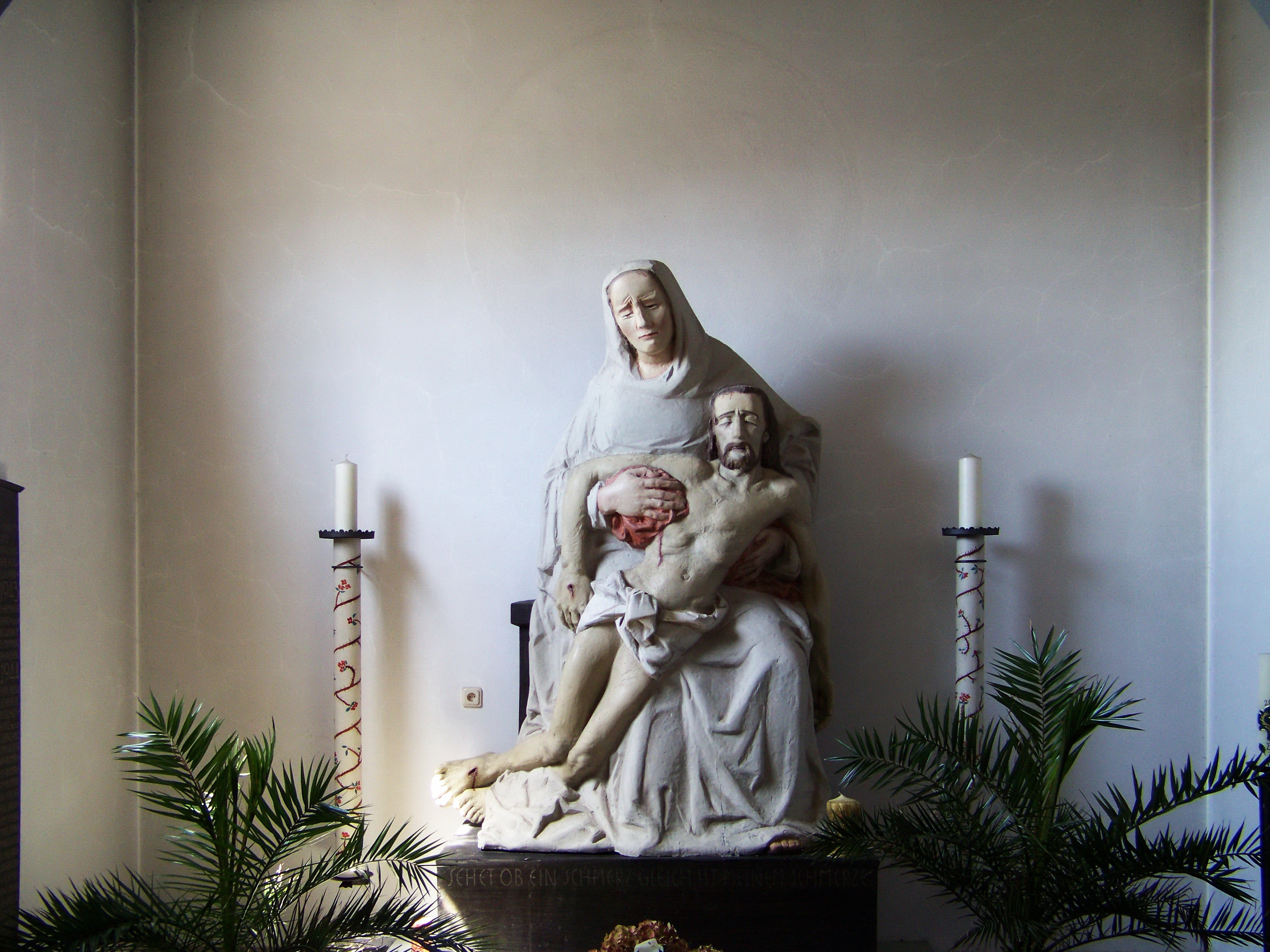 Mamming, Hauptstraße 26. Katholische Pfarrkirche St. Margareta. Die gotische Kirche aus dem 15. Jahrhundert wurde in den letzten Kriegstagen 1945 zerstört. Die heutige Kirche wurde 1947/49 nach Plänen von Friedrich Haindl, München neu erbaut. In der Seitenkapelle in der Nordwestecke des Langhauses steht eine überlebensgroße Pietà, die Josef Henselmann bereits 1925 geschaffen hat.